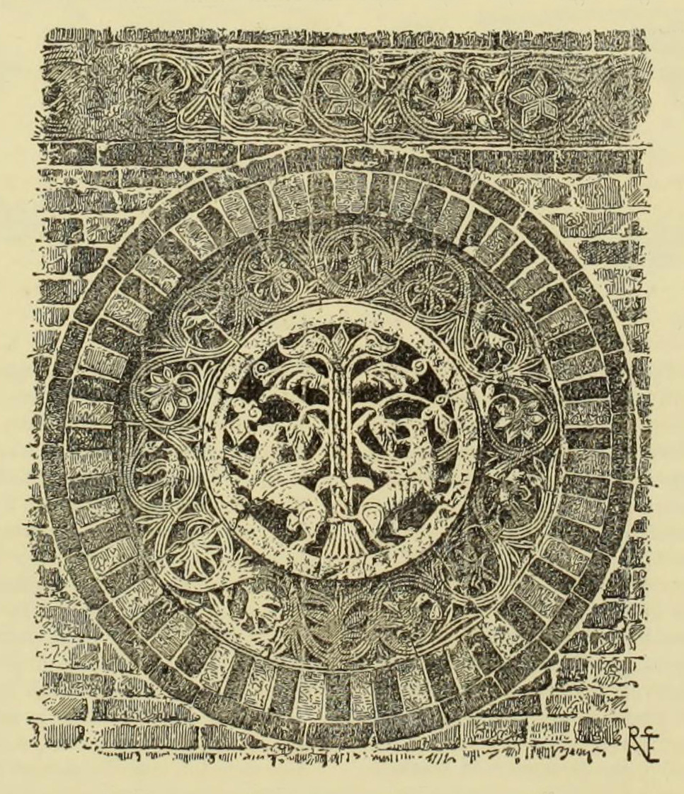 Raffaele Cattaneo, rilievo autografo di un oculo traforato dell'Abbazia di Pomposa, Codigoro, per la serie La Basilica di San Marco in Venezia illustrata nella storia e nell'arte da scrittori veneziani